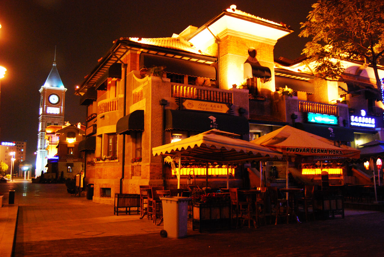 天津意大利风情区某西餐厅